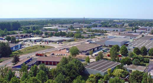 Industrie-terrein Stadskanaal met op de achtergrond de voormalige Philipsfabrieken Categorie:Afbeelding Stadskanaal Categorie:Stadskanaal